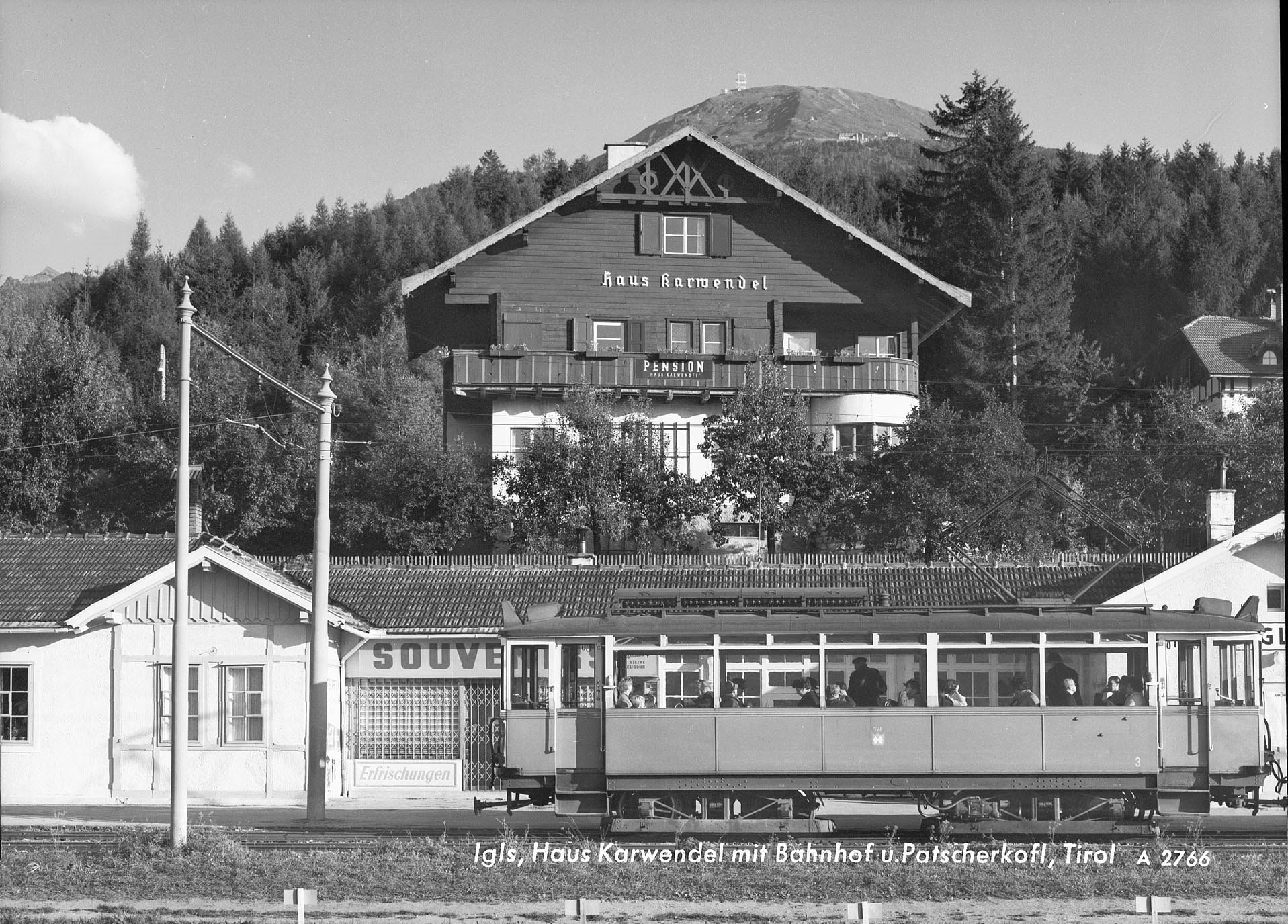 TW3 der Innsbrucker Mittelgebirgsbahn in Igls. Blick auf Haus Karwendel mit Bahnhof und Patscherkofel